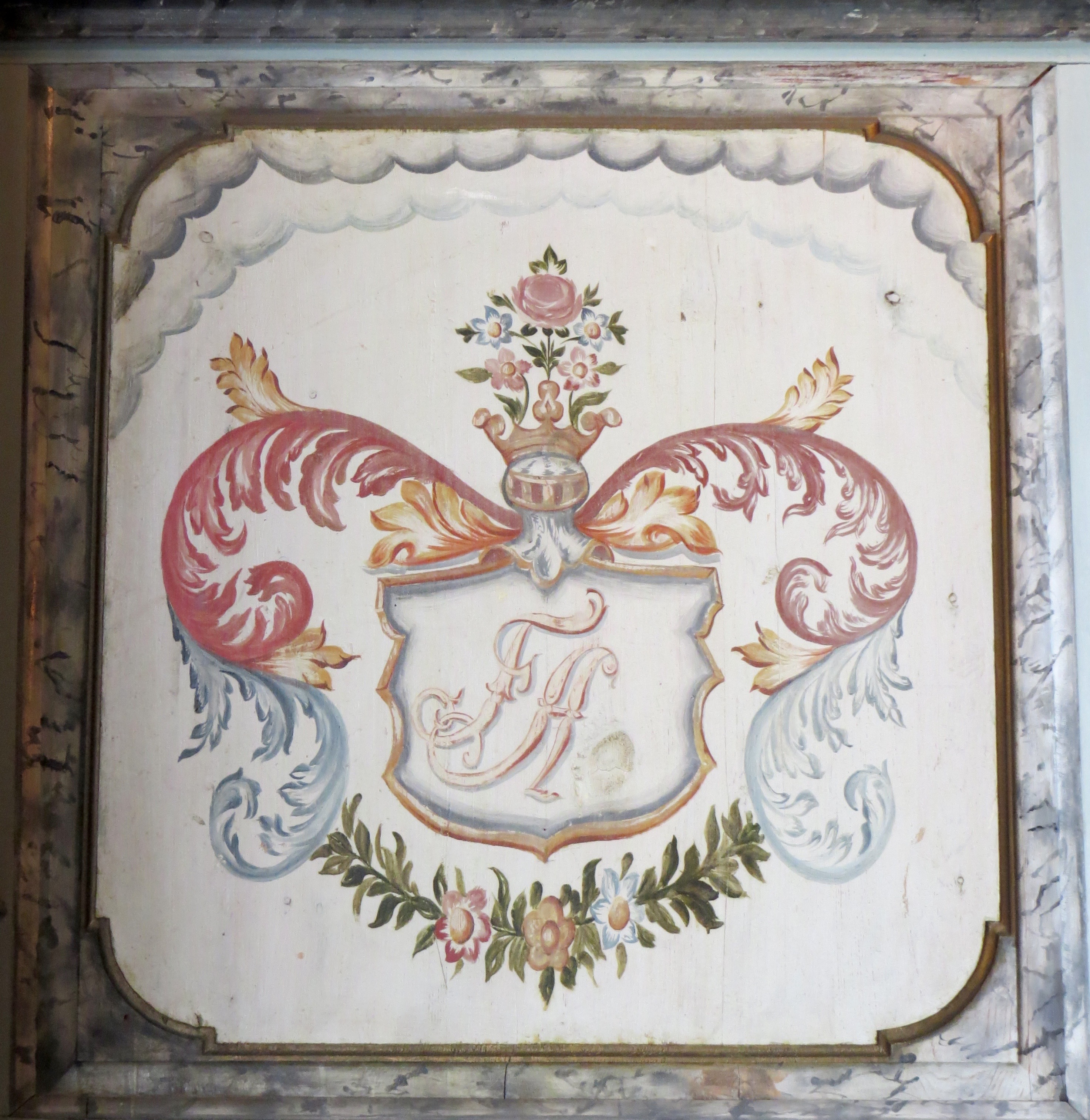 Frederik Adelers (1700–1766 ) initialer i Solum Kirke, Skien. Se: Hans Cappelen: «Talende våpenskjold», Varden 2.7.1966